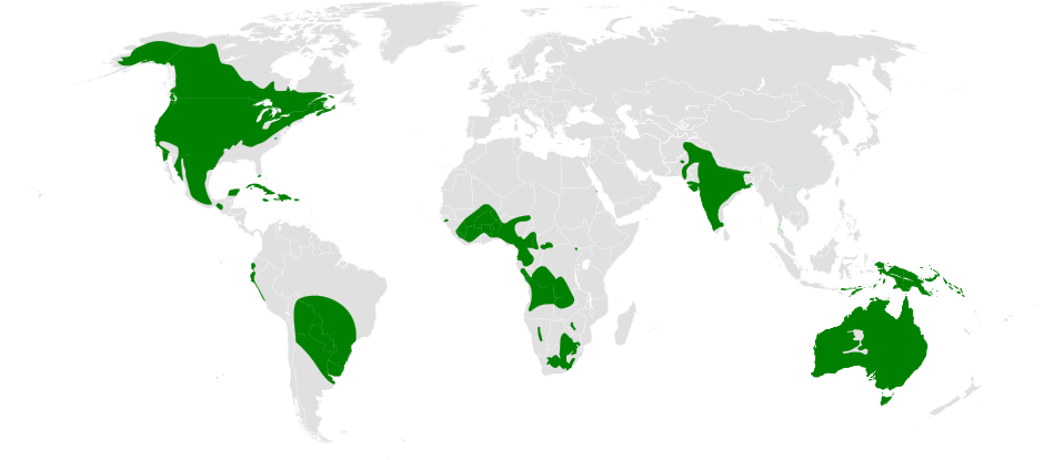 Petrochelidon distribution map